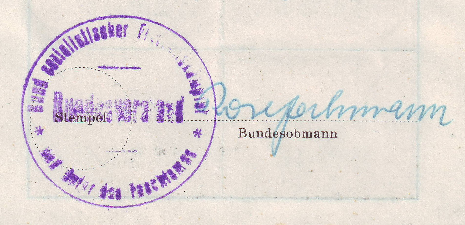 Unterschrift Rosa Jochmann (mit Stempel "Bund Sozialistischer Freiheitskämpfer und Opfer des Faschismus") - Ausschnitt aus einem Mitgliedsausweis des "Bundes Sozialistischer Freiheitskämpfer und Opfer des Faschismus", ausgestellt 1957